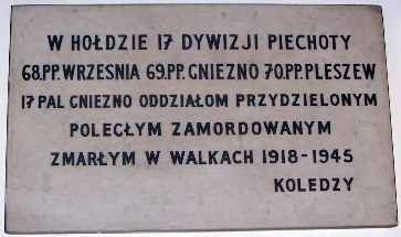 Tablica w kościele św. Andrzeja Boboli w Londynie